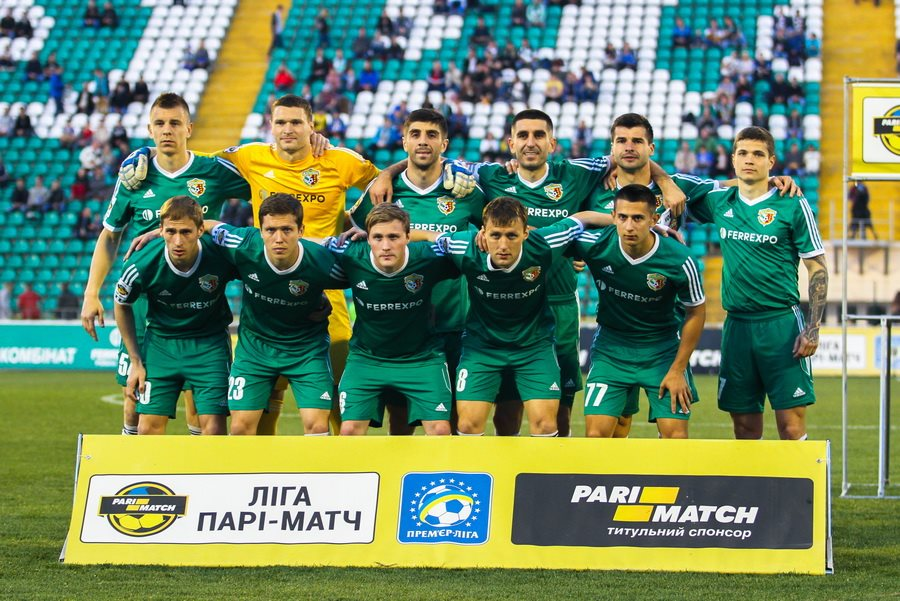 Склад ФК Ворскла Полтава